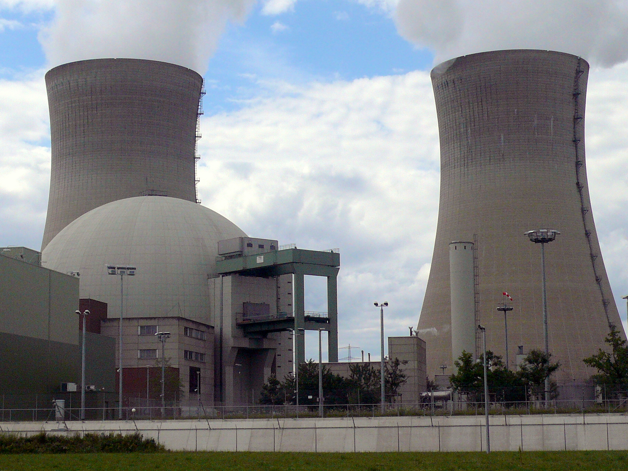 Kernkraftwerk Grafenrheinfeld